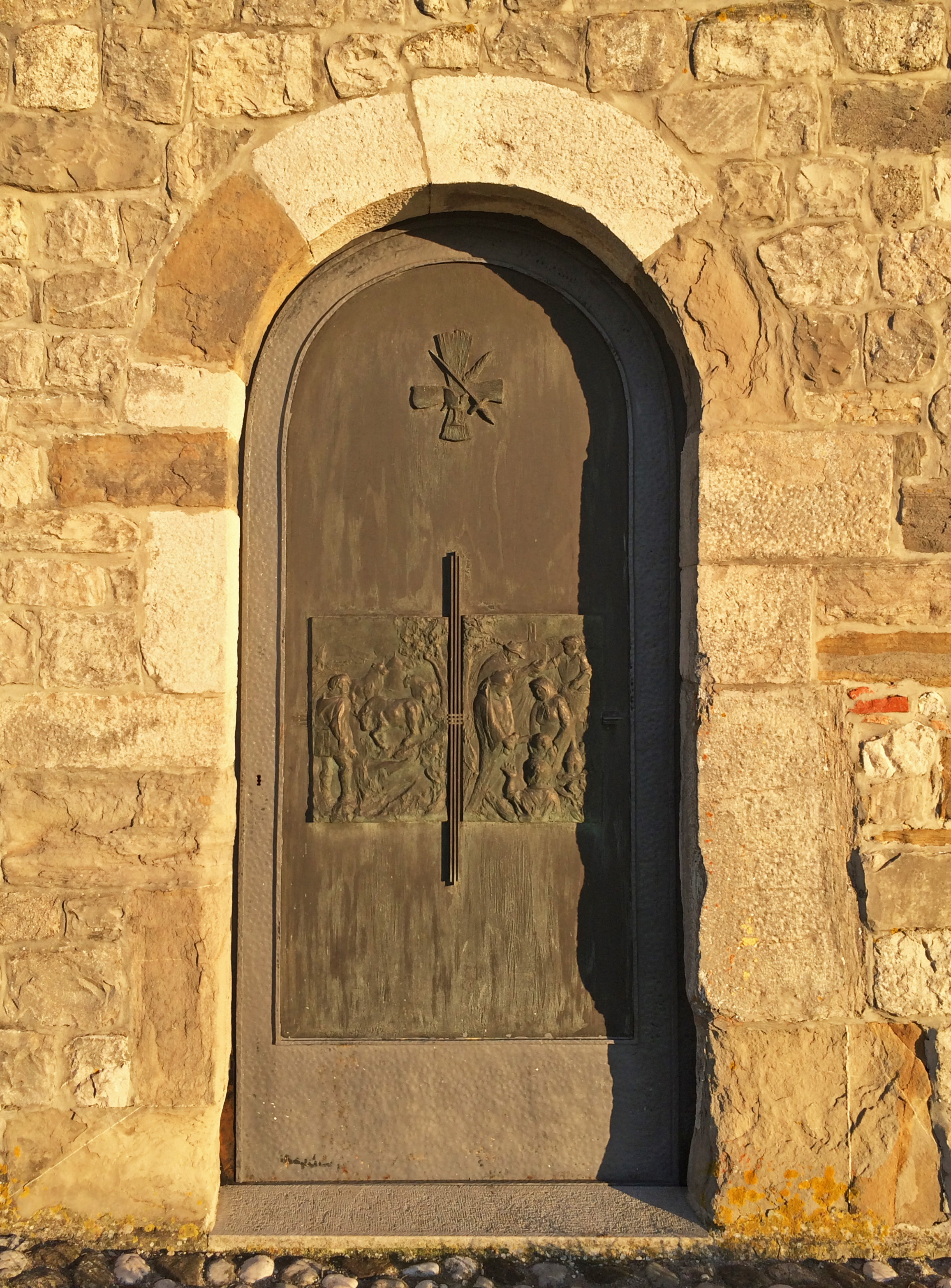 Orzano, frazione di Moimacco: il portale della chiesa di San Donato in Valle.